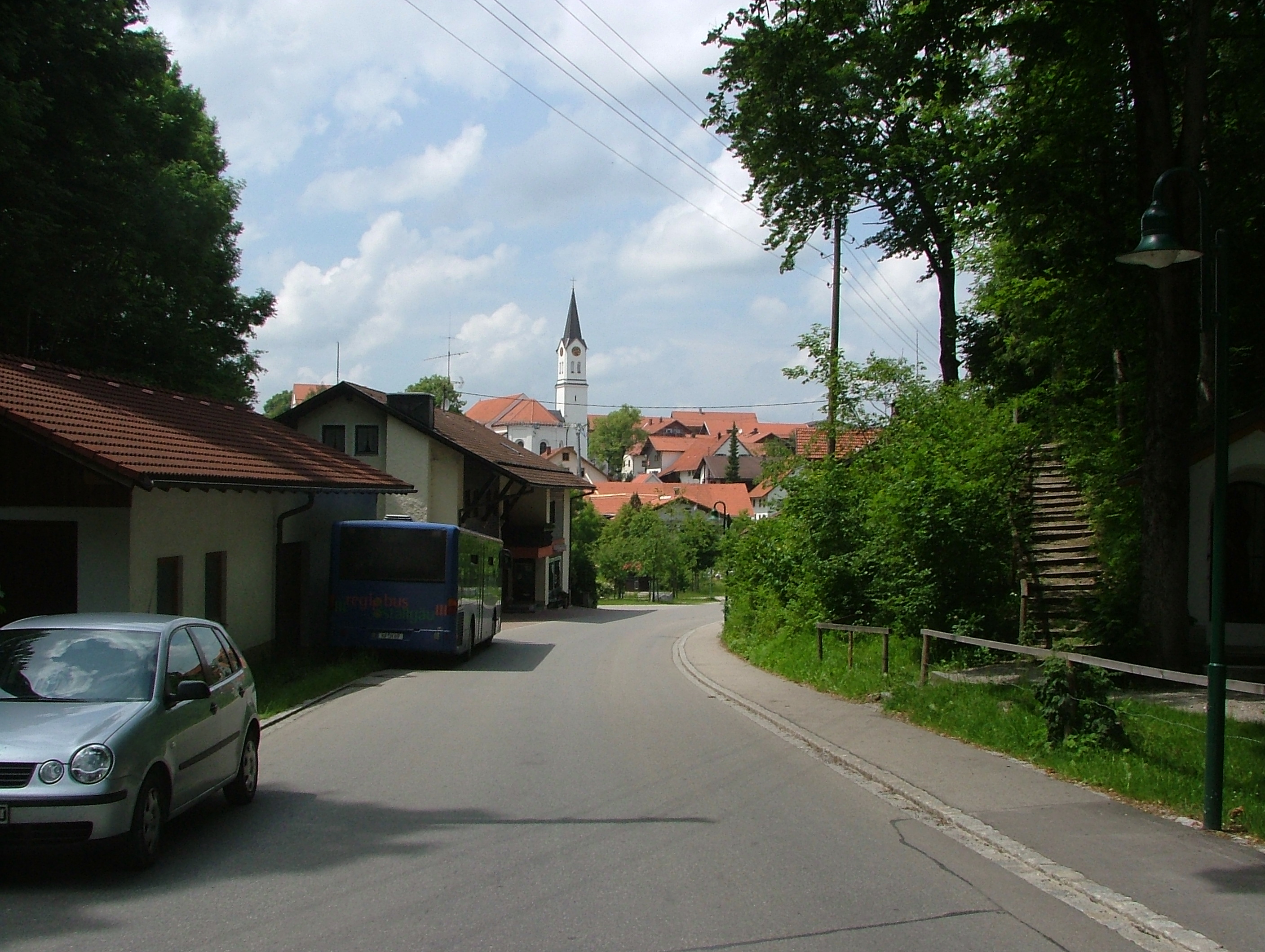 Görisried